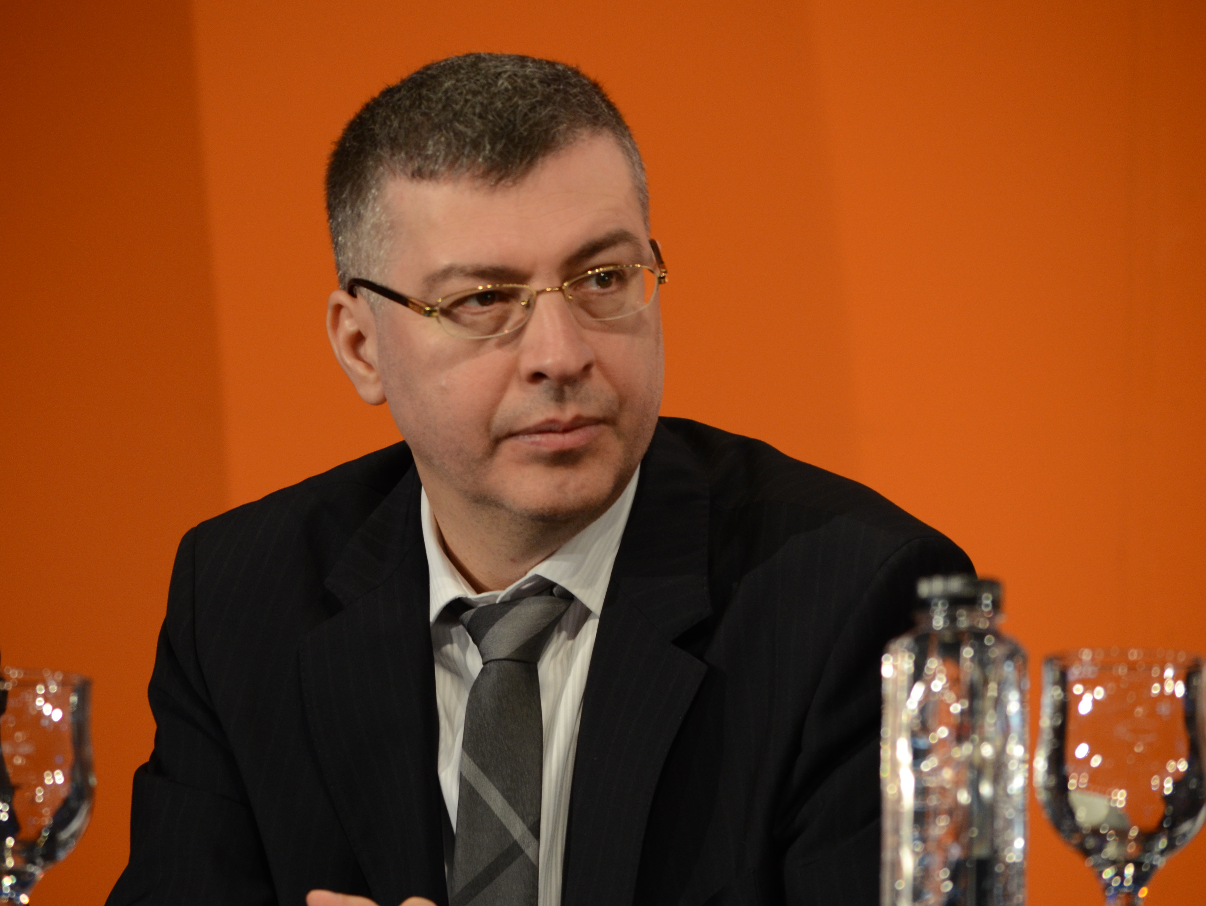 Ionuț Popescu (la Convenția națională extraordinară a Partidului Democrat-Liberal, 23 martie 2013)